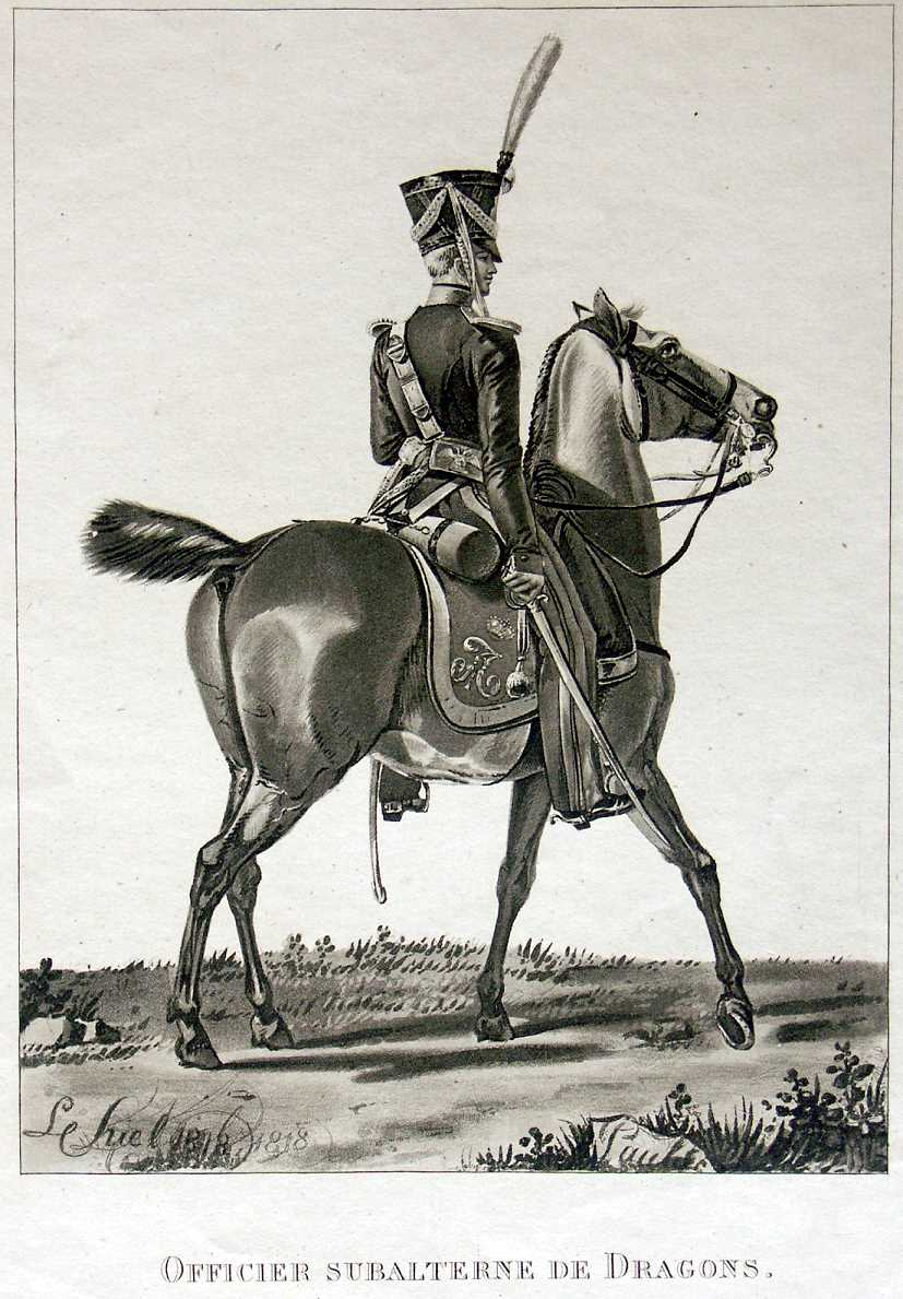 Обер-офицер Драгунских полков